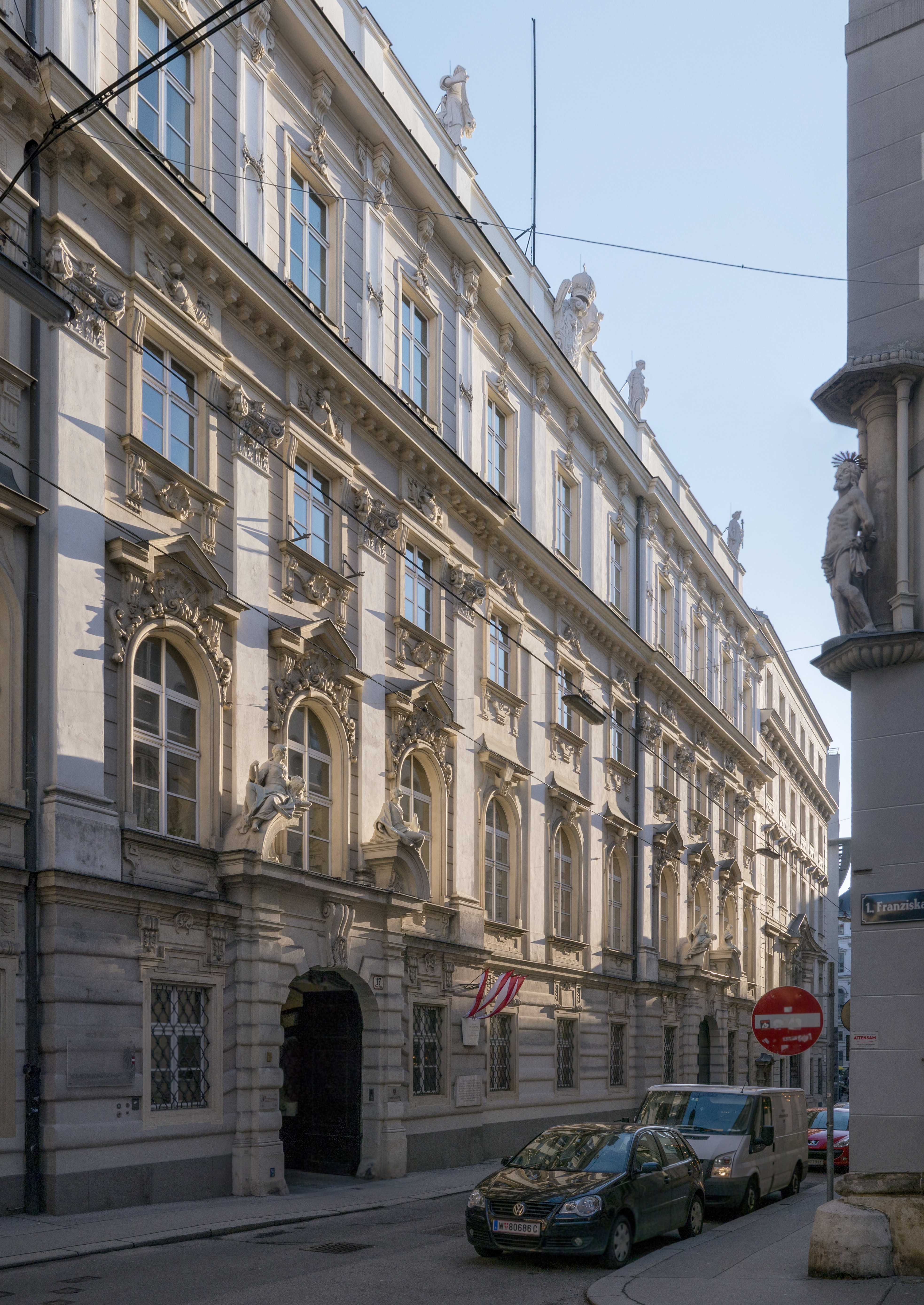 Ehem. Stadtbancogebäude, ehem. Palais Rottal